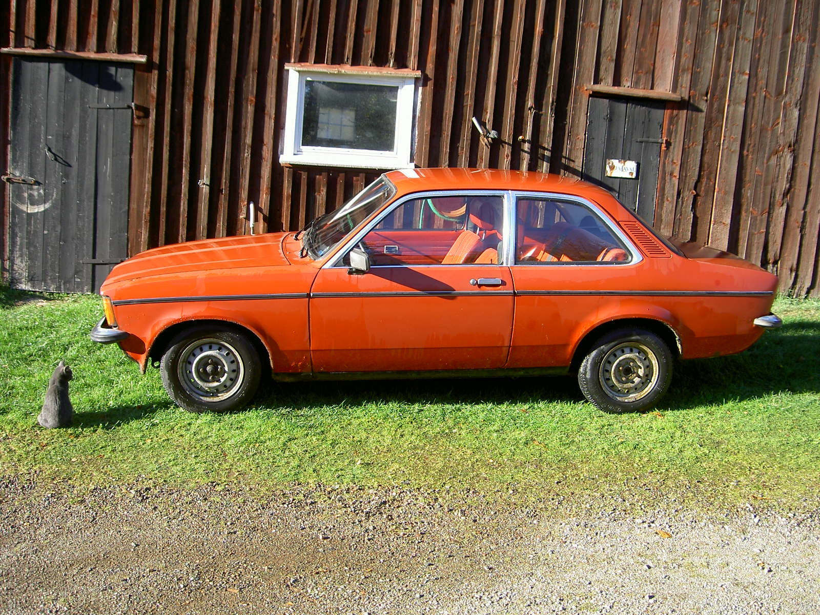 Opel Kadett 1.2S (Model C ,from -78)